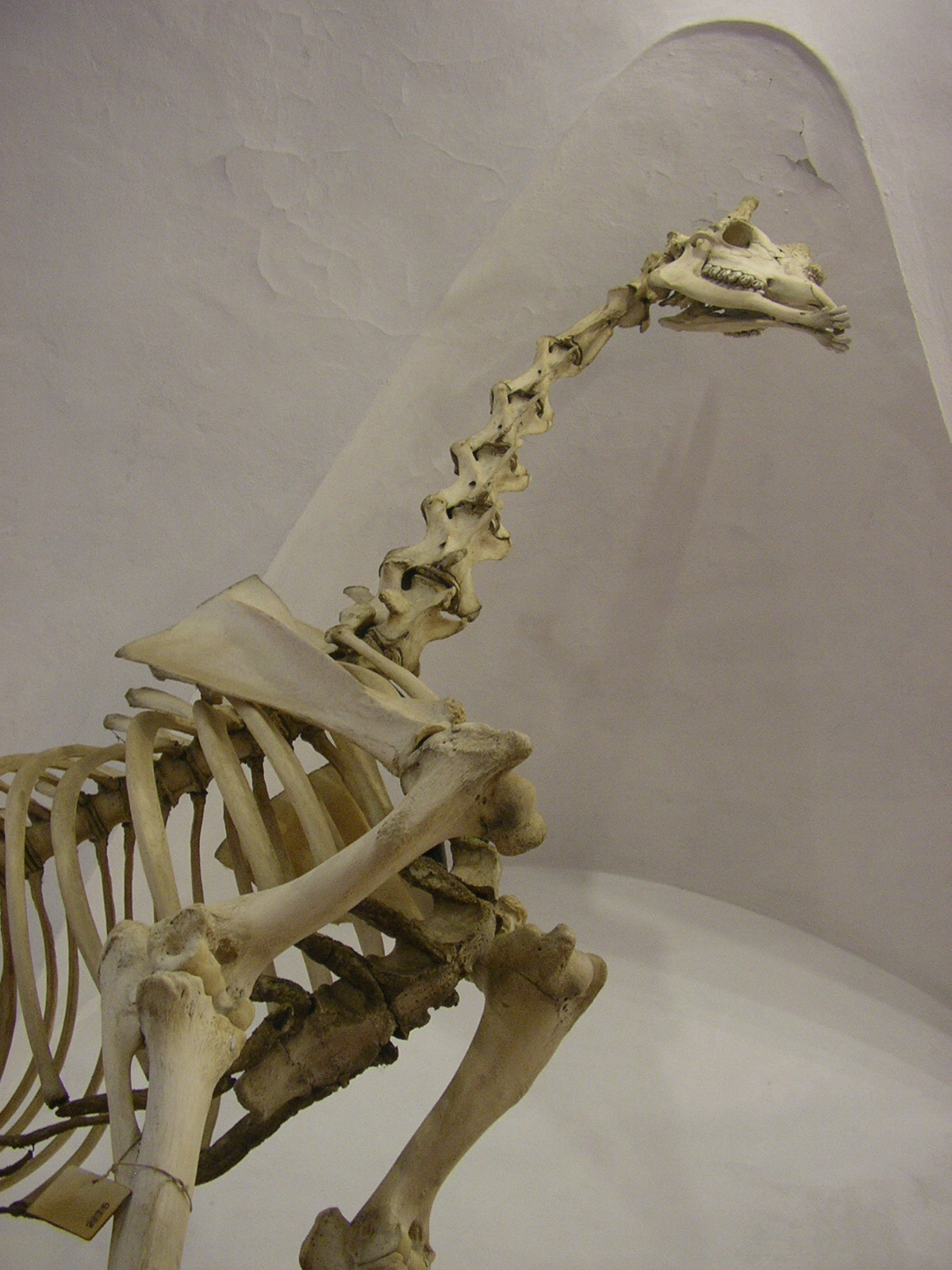 A giraffe skeleton in the Certosa di Pisa museum, Calci, Pisa, Italy